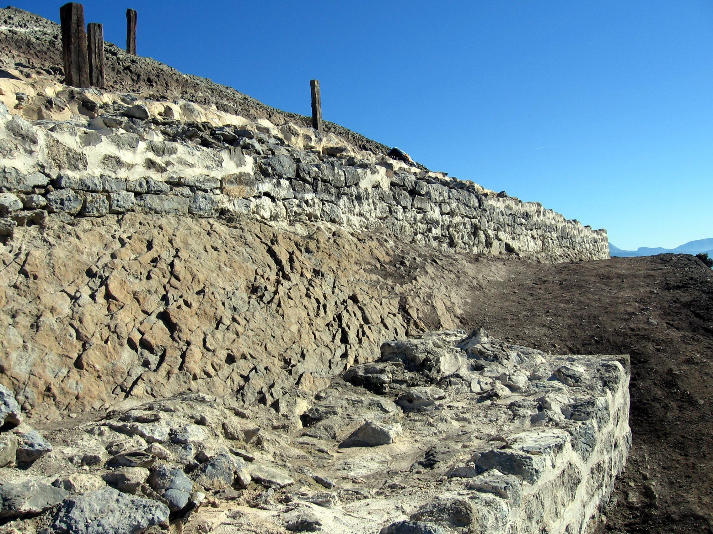 Untzueta gaztelua